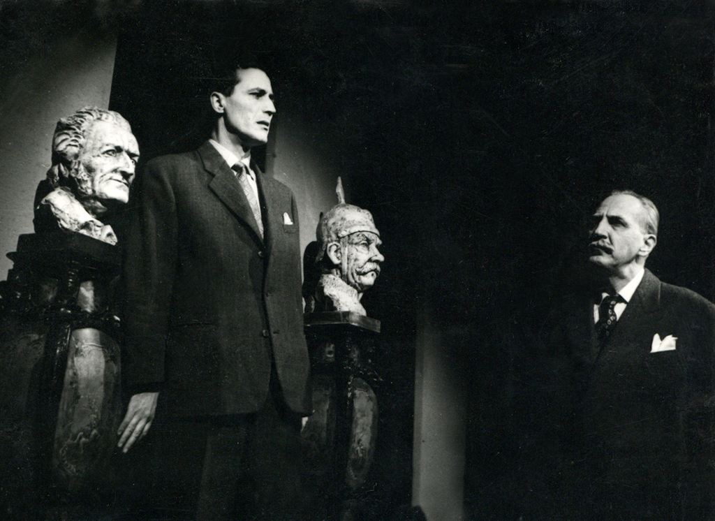 Jean-Paul Sartre, Zaprti v Altoni, Mestno gledališče v Ljubljani. Na fotografiji: Vladimir Skrbinšek (Oče von Gerlach), Janez Albreht (Franz).